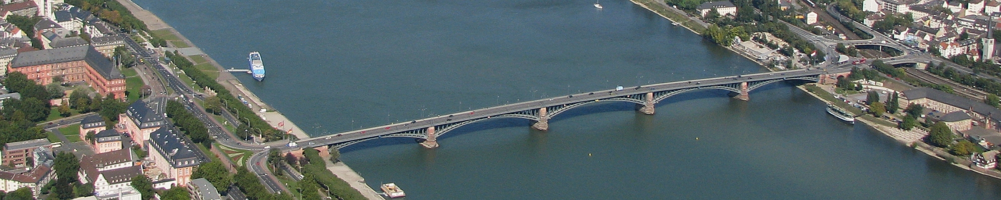 Mainz Luftbild Theodor-Heuss-Brücke nach Mainz-Kastel Foto 2008 Wolfgang Pehlemann Wiesbaden IMG_0088.jpg